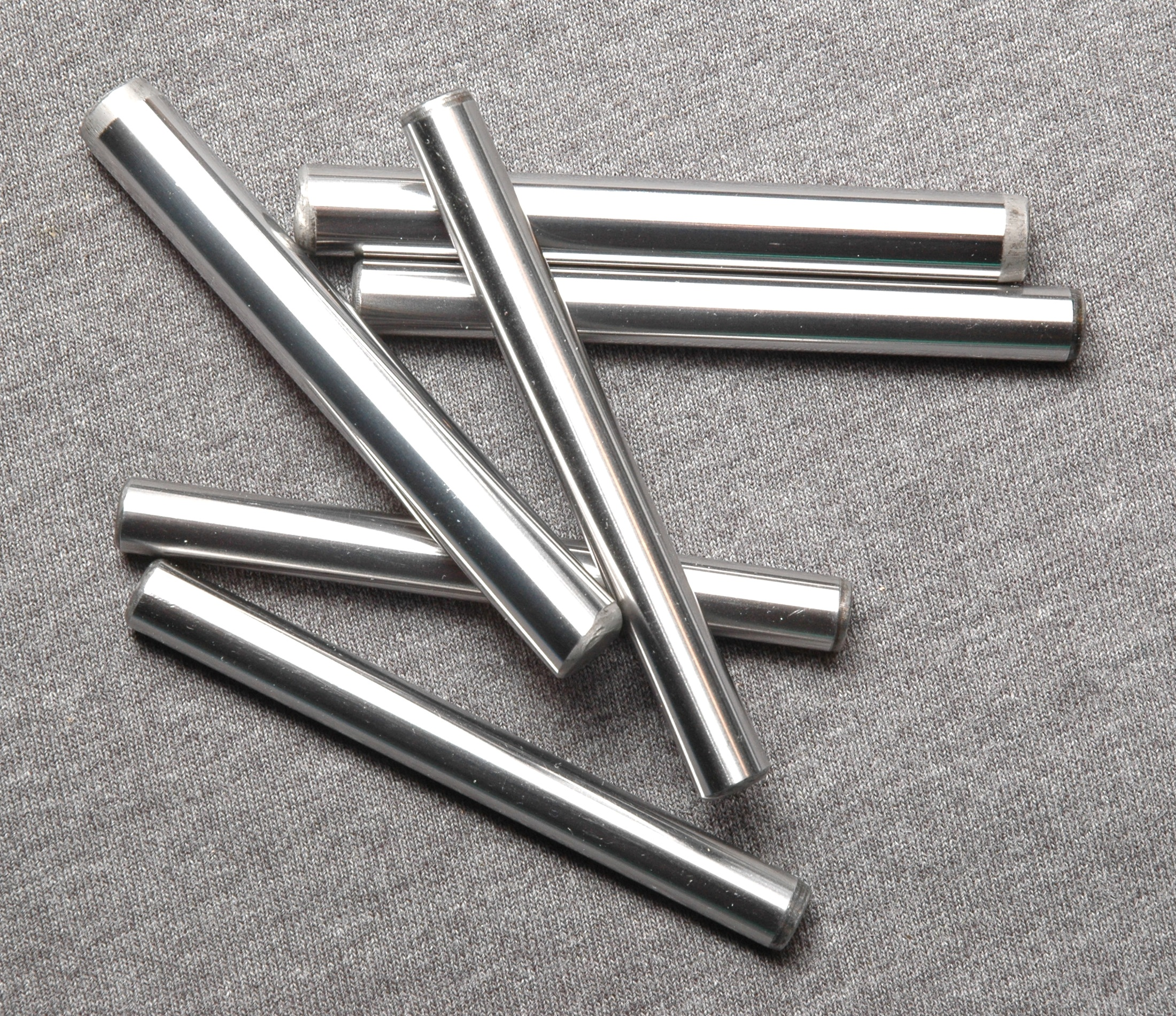 Steel dowel pins